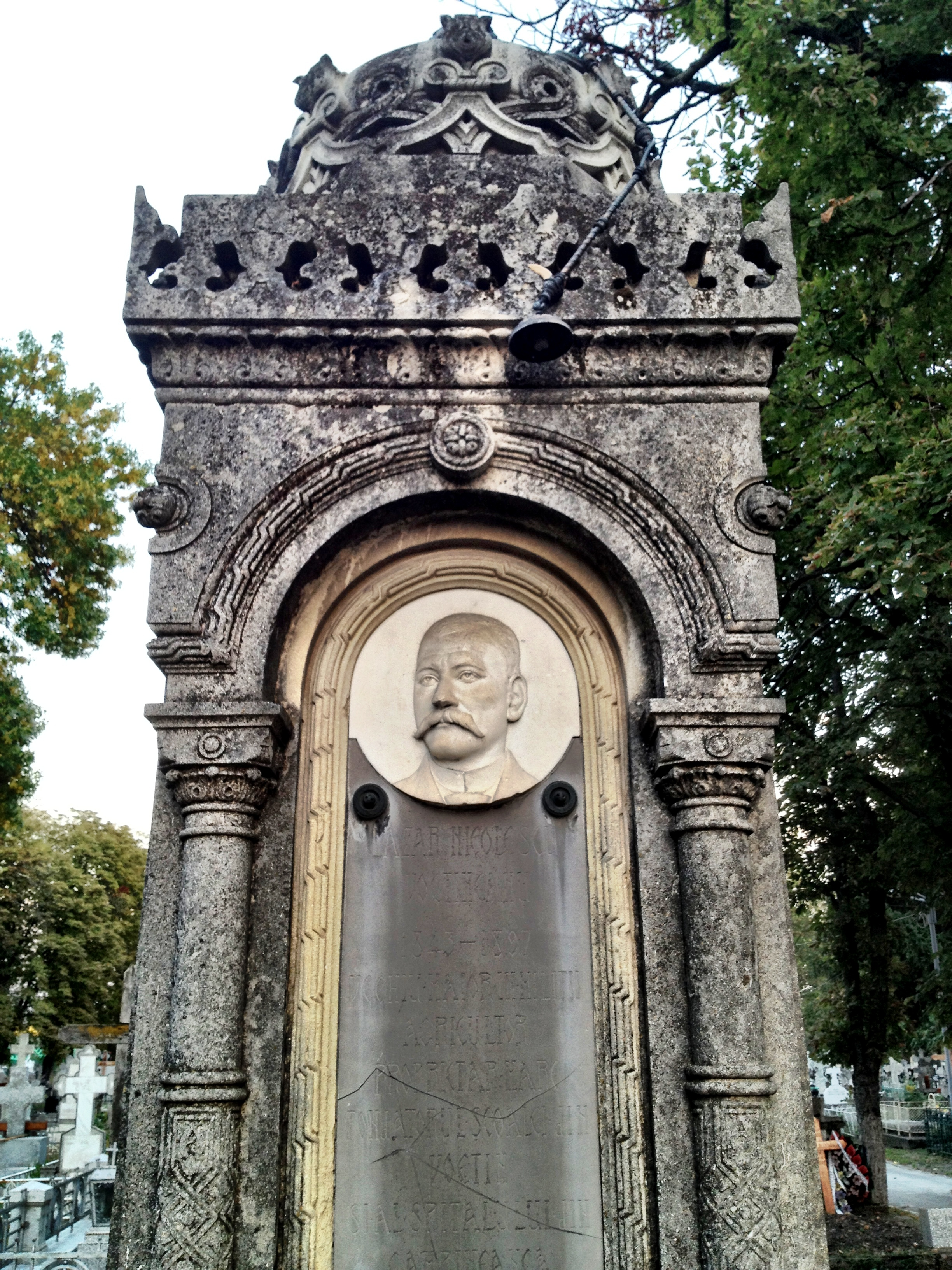 Basorelief maior Lazăr Nicolescu - Voitineanu